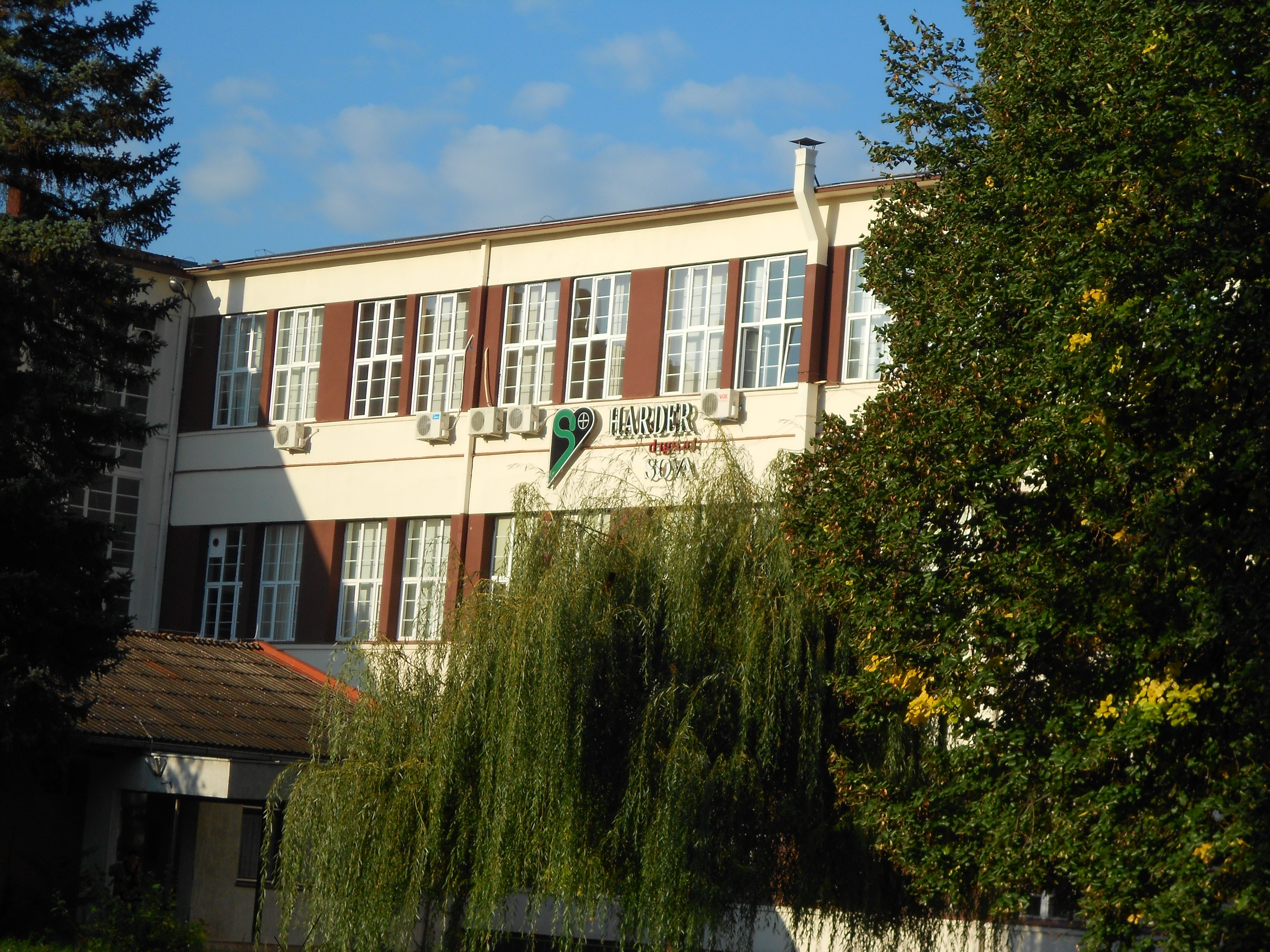 Драган Цветковић Ниш Део зграде Хардер дигитал Сова у Нишу